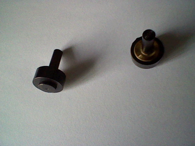 節水コマ 水道の蛇口に入れるもの